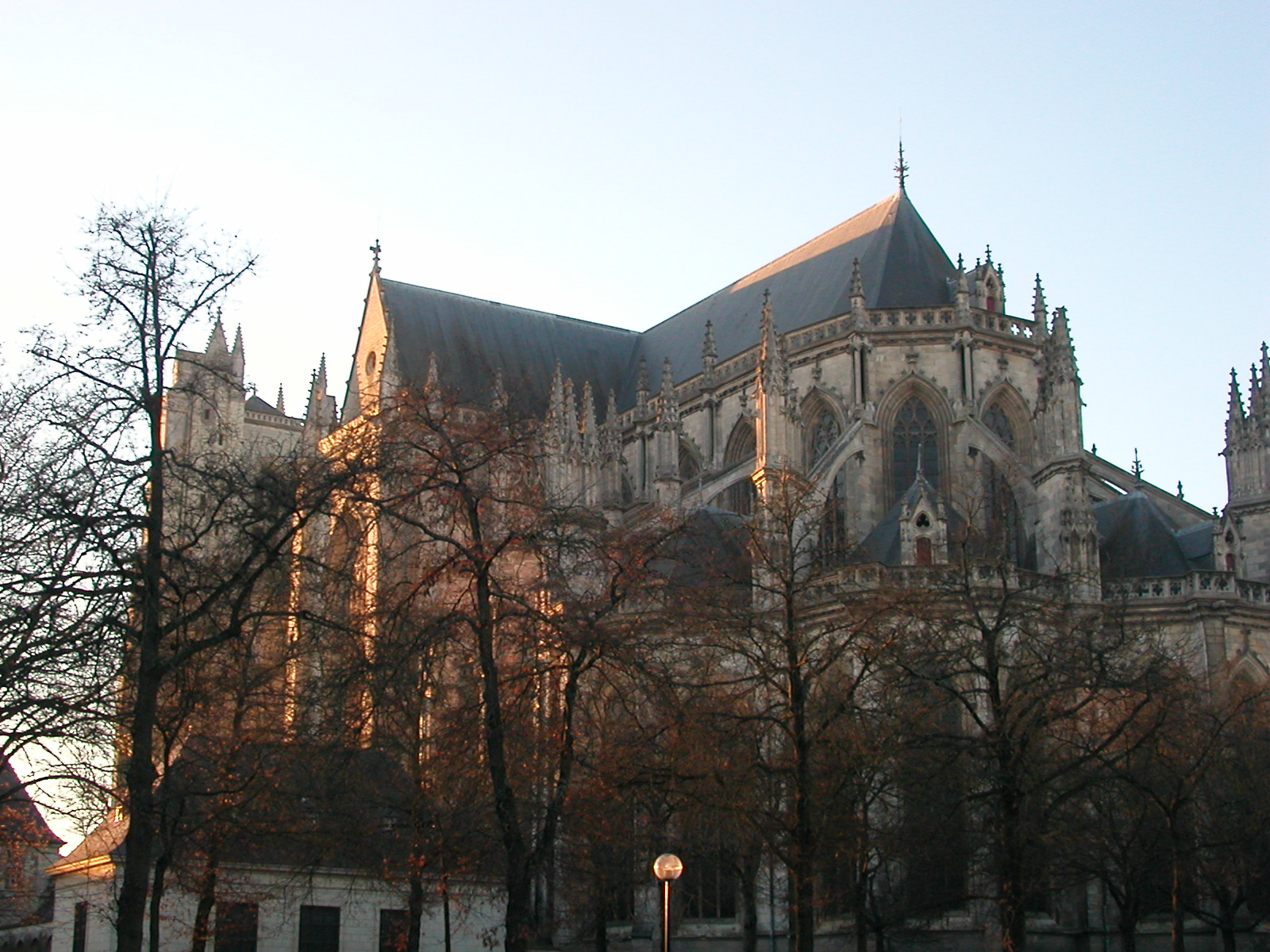 Chevet de la Cathédrale Saint-Pierre de Nantes